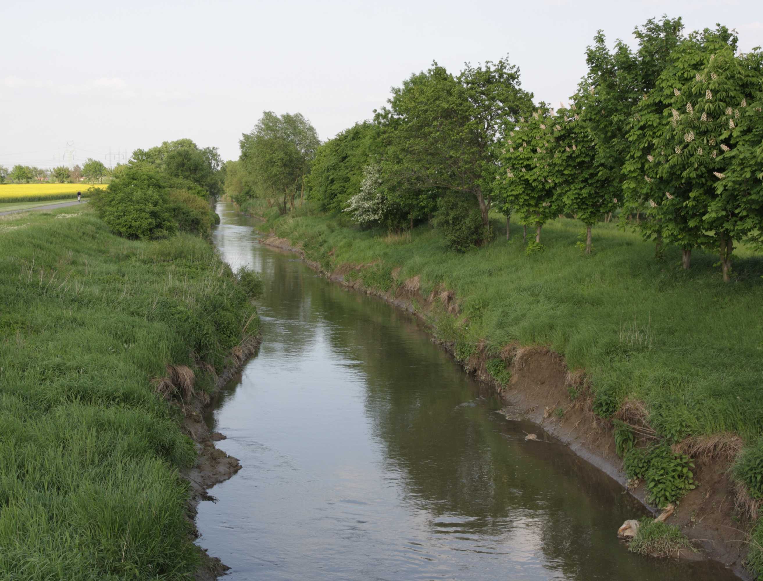 Litava u Žatčan